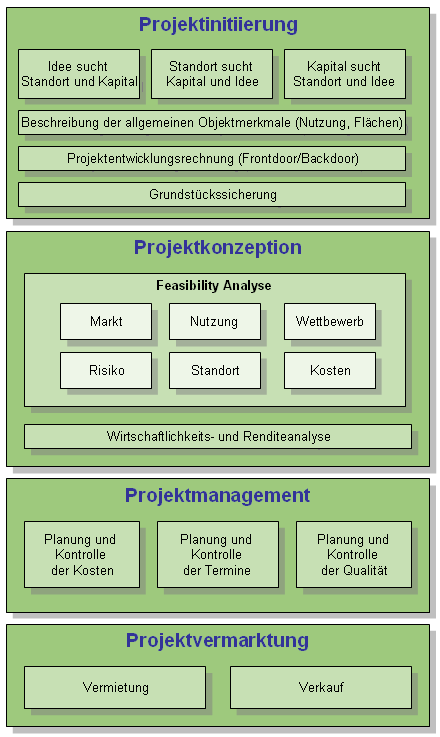 Projektentwicklung-Phasen